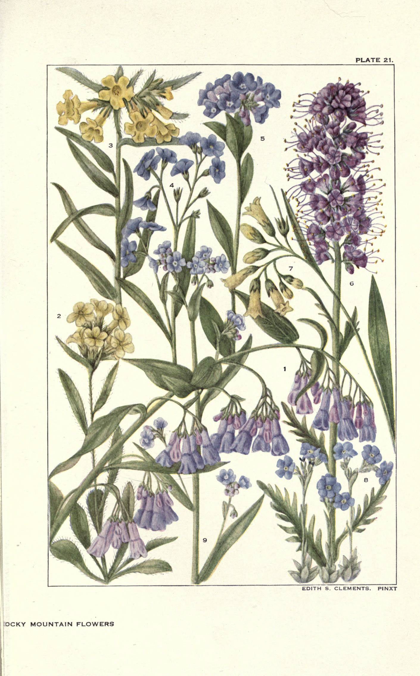 PLATE 21. Mertensia sibirica Krynitzkia leucophaea = Cryptantha leucophaea Lithospermum multiflorum Myosotis alpestris Mertensia alpina Phacelia sericea Symphytum officinale Eritrichium argenteum = Eritrichium nanum var. argenteum Lappula floribunda = Hackelia floribunda